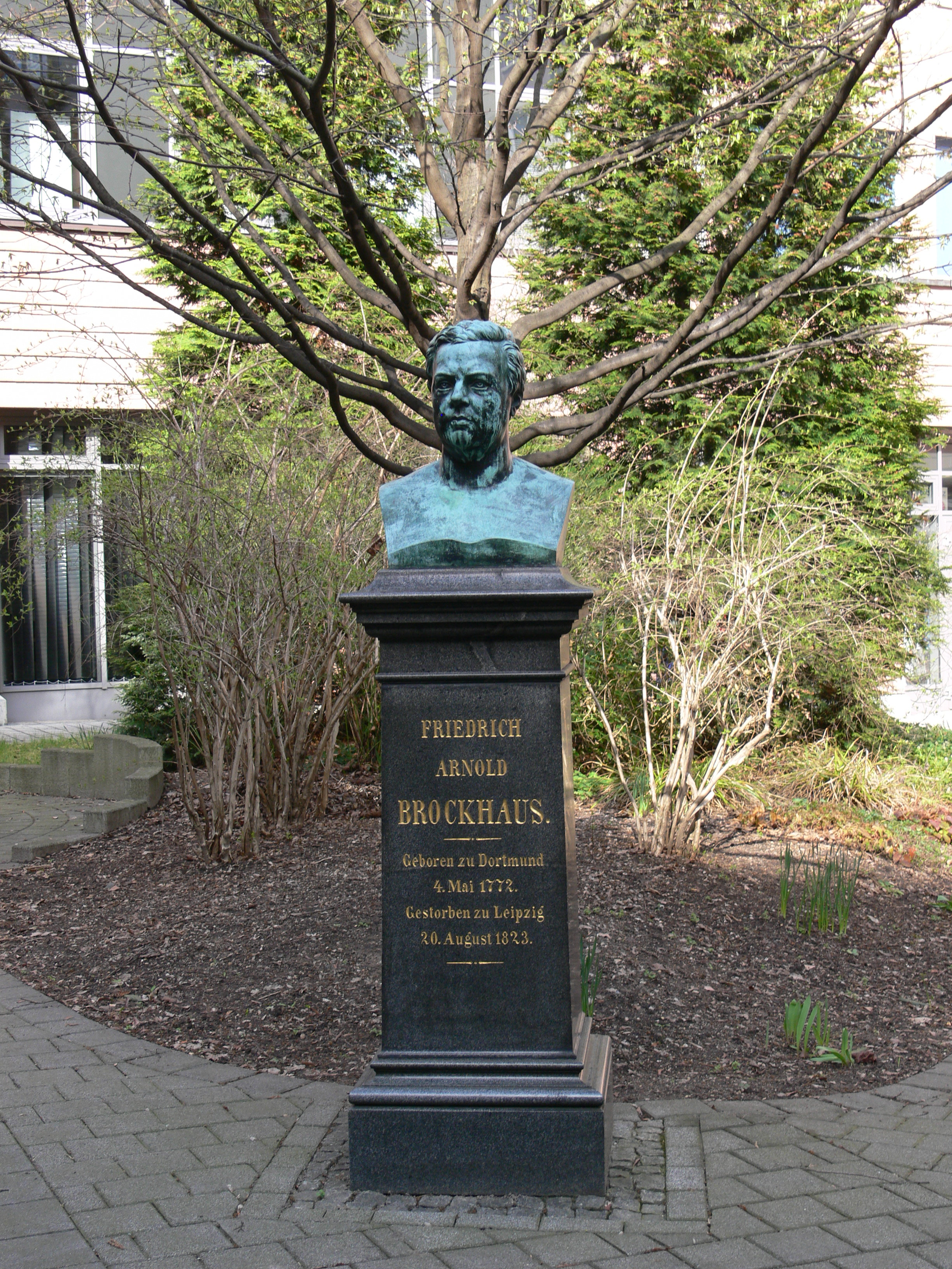 Leipzig, Großer Brockhaus, Denkmal für F. A. Brockhaus